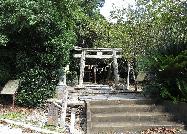 多久頭魂神社（長崎県対馬市厳原町豆酘）入口